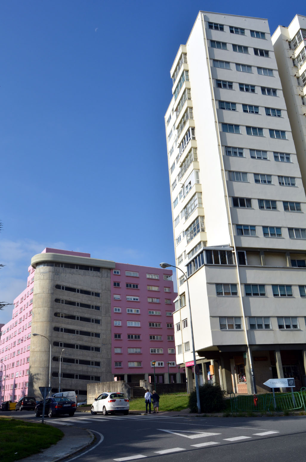 Bloques del Poligono de Caranza en Ferrol en la calle Alcalde Quintanilla. En segundo término, el bloque L10 de la Unidad 2.